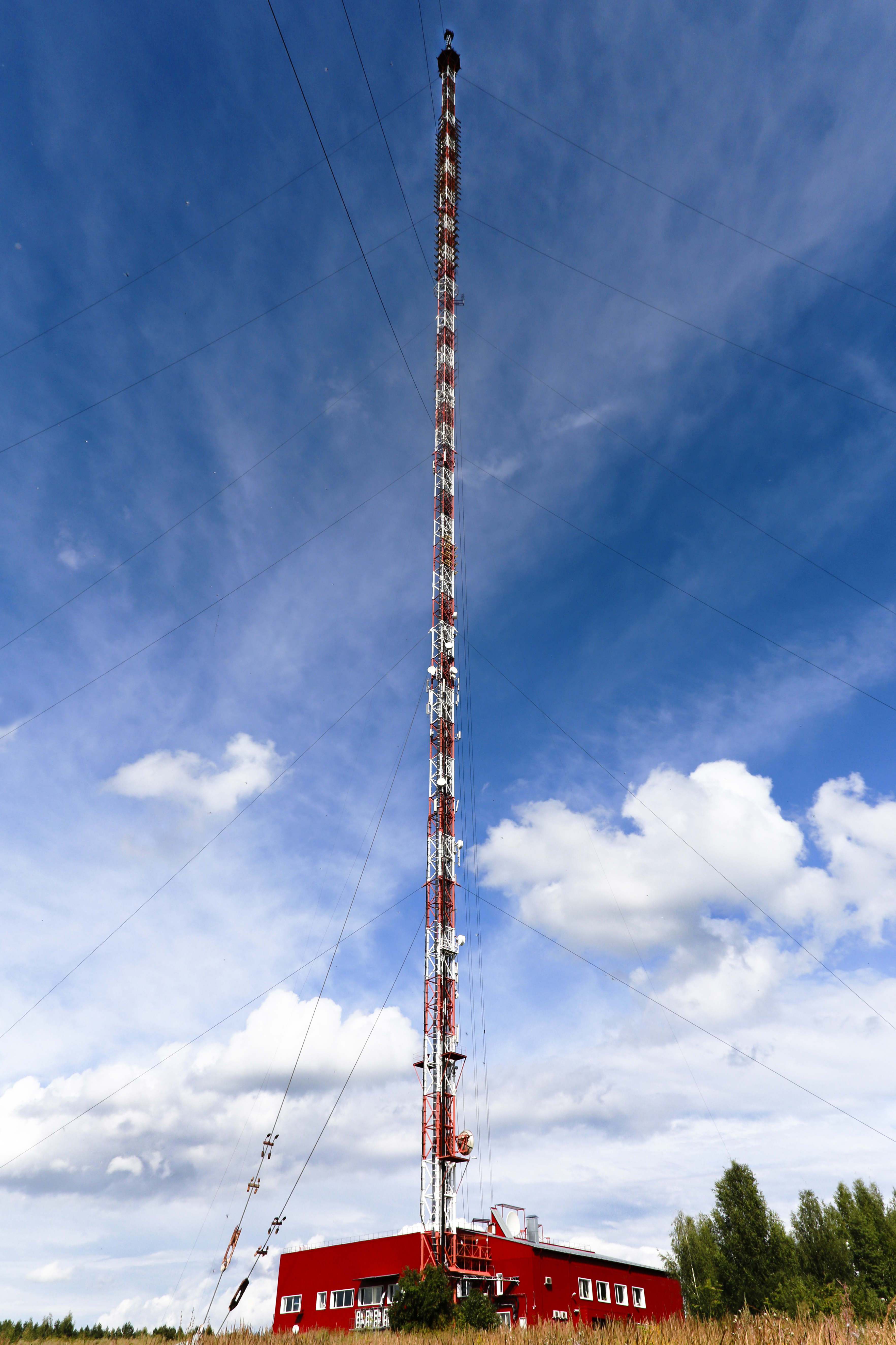 Высота мачты 345, в зоне охвата проживает около 800 тыс. жителей республики